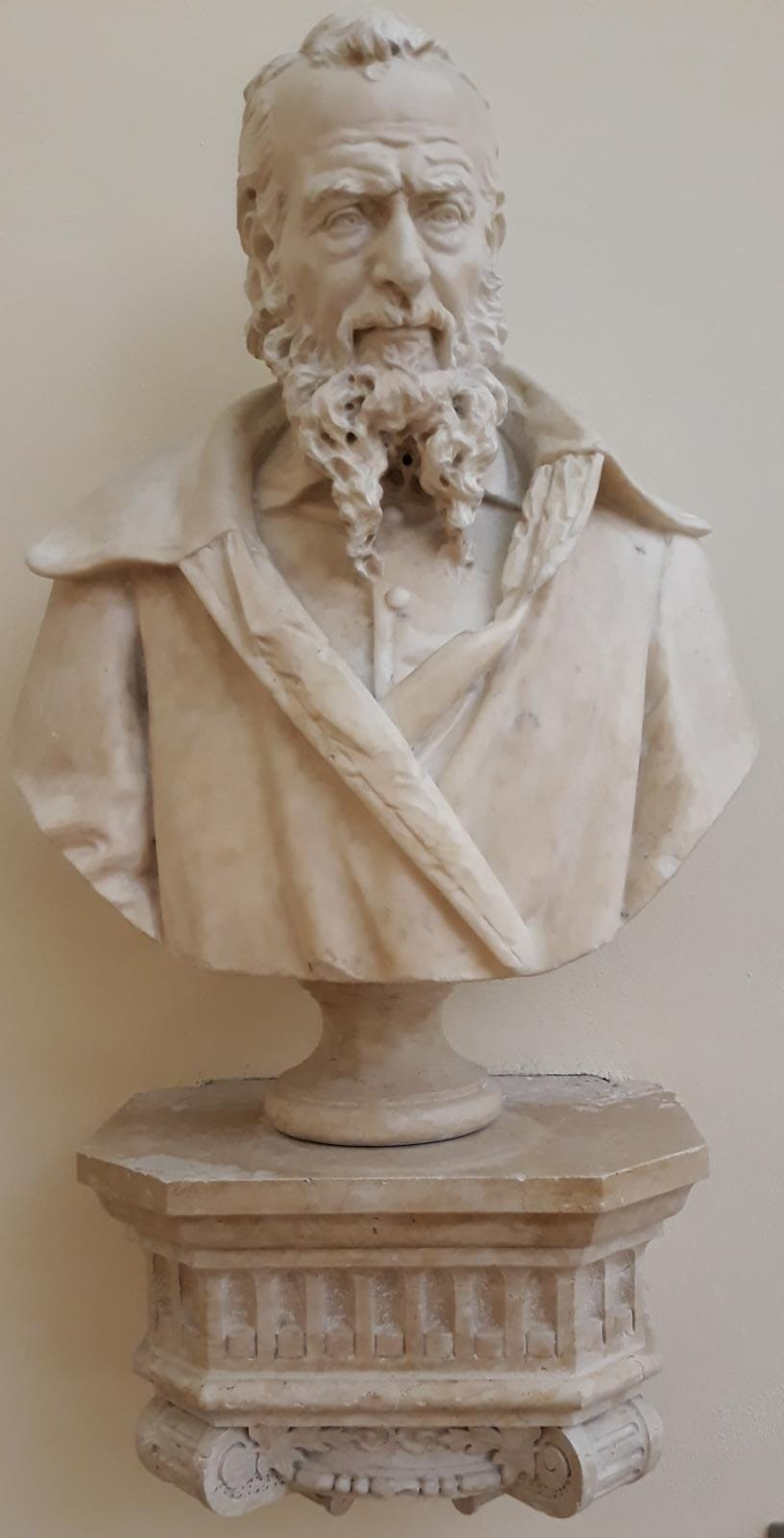 Busto di Gian Battista da Monte